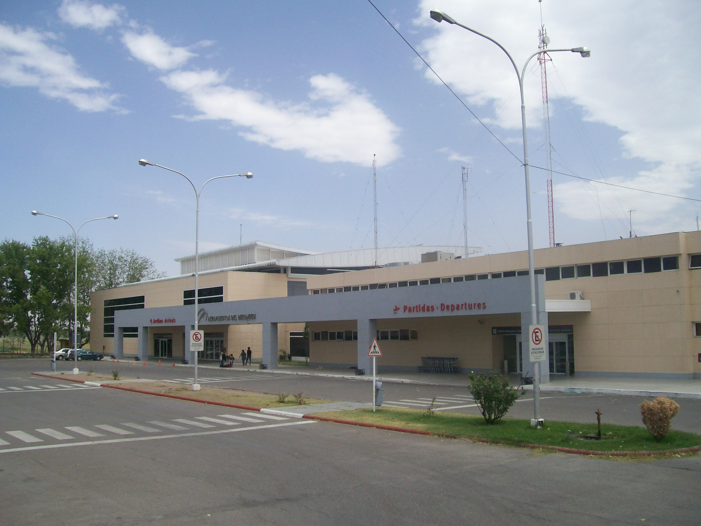 Aeropuerto de Neuquen